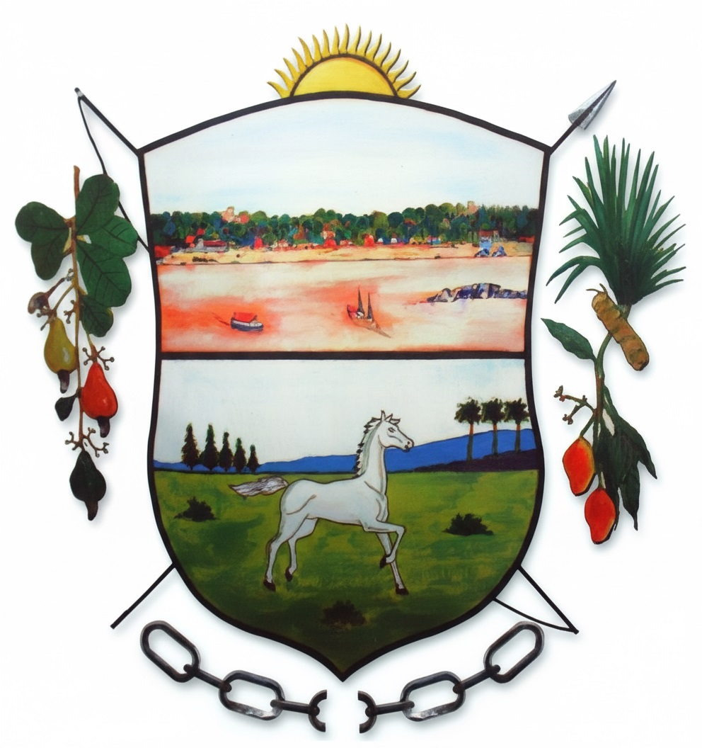 Escudo Municipio Independencia, Estado Anzoátegui.